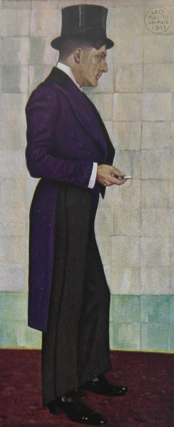 Selbstporträt im blauen Frack